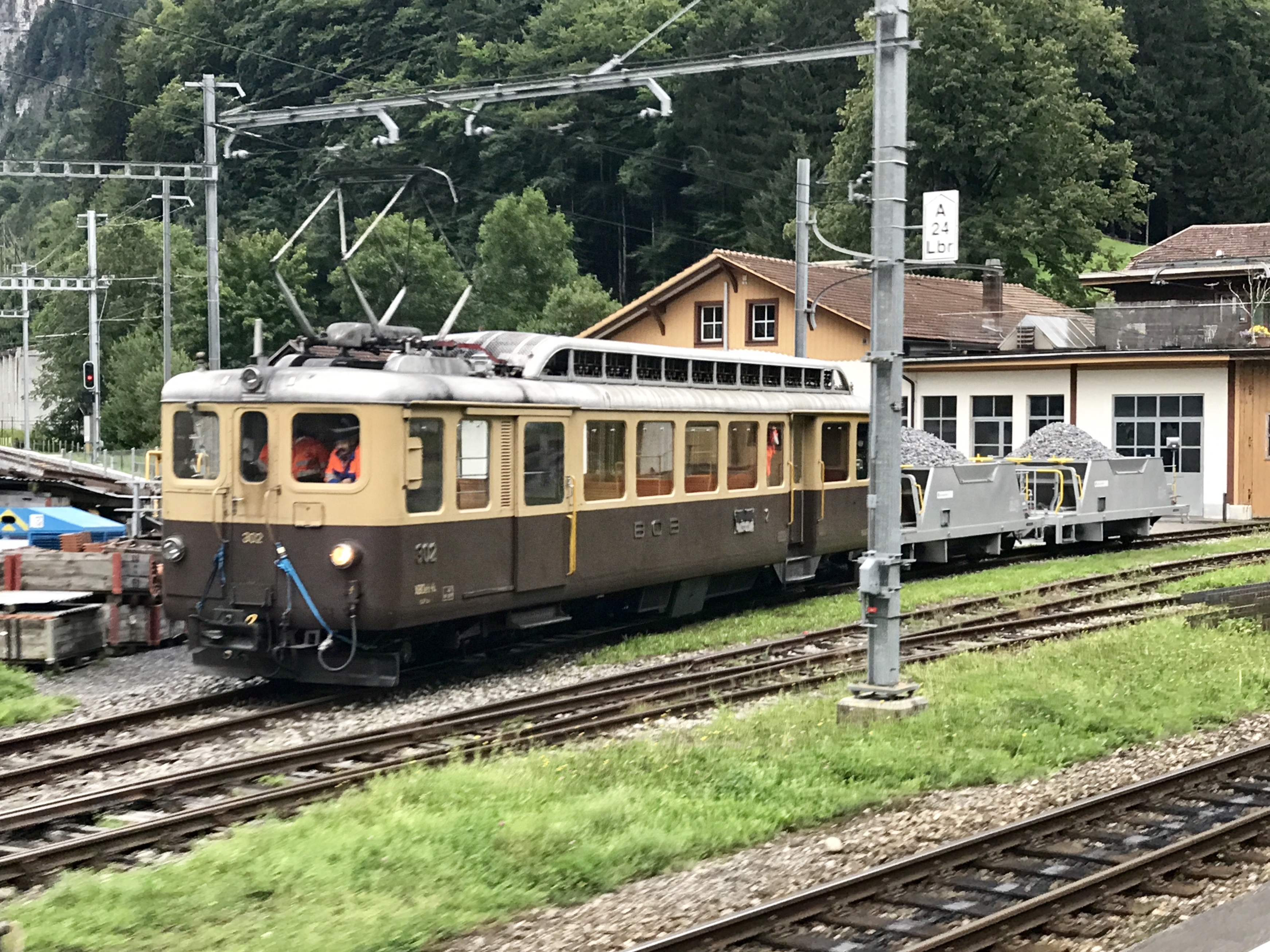 Der BOB ABDeh 4/4 302 mit Kieswagen in Zweilütschinen